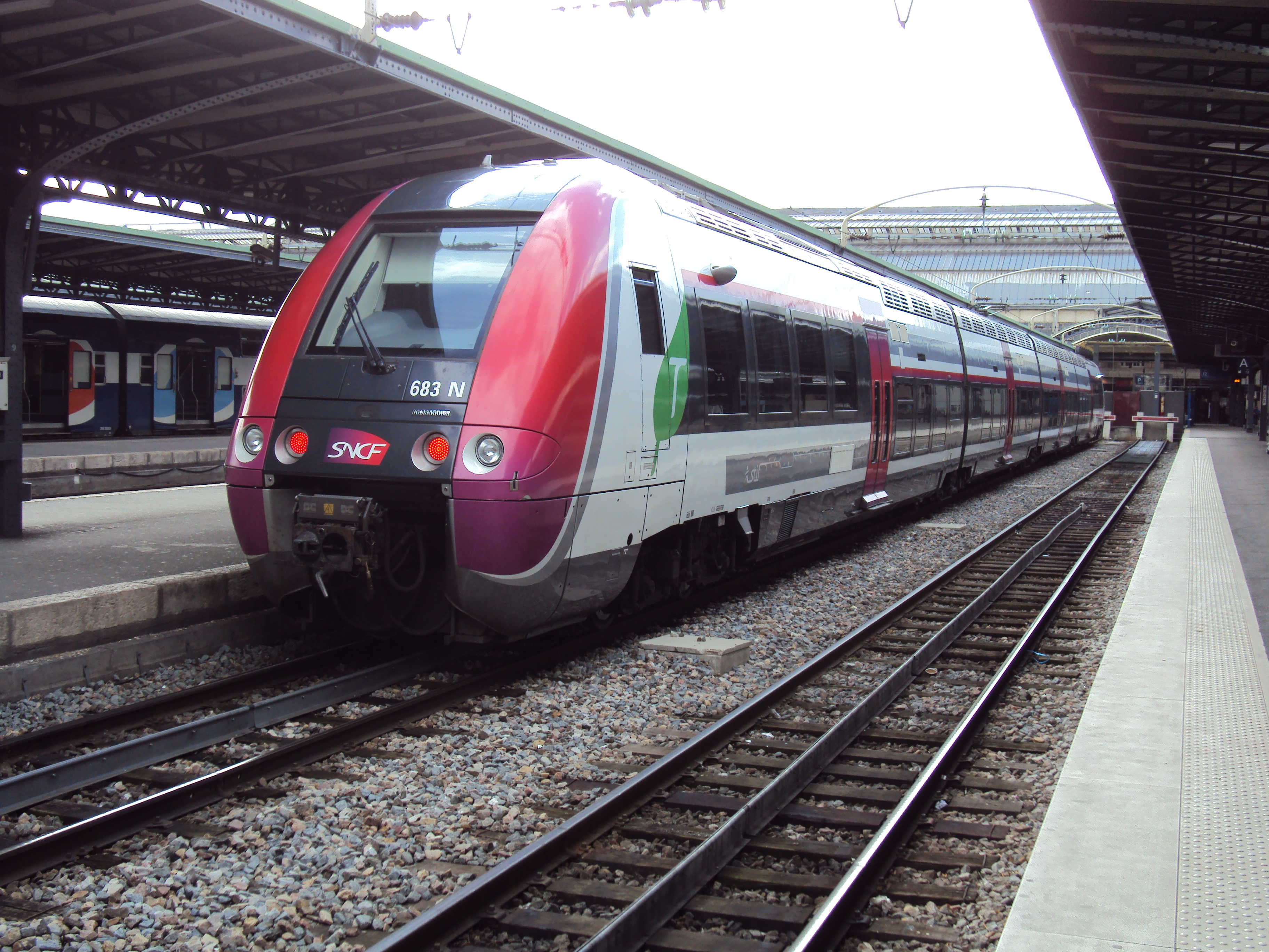 La rame BGC 683 en gare de l'Est